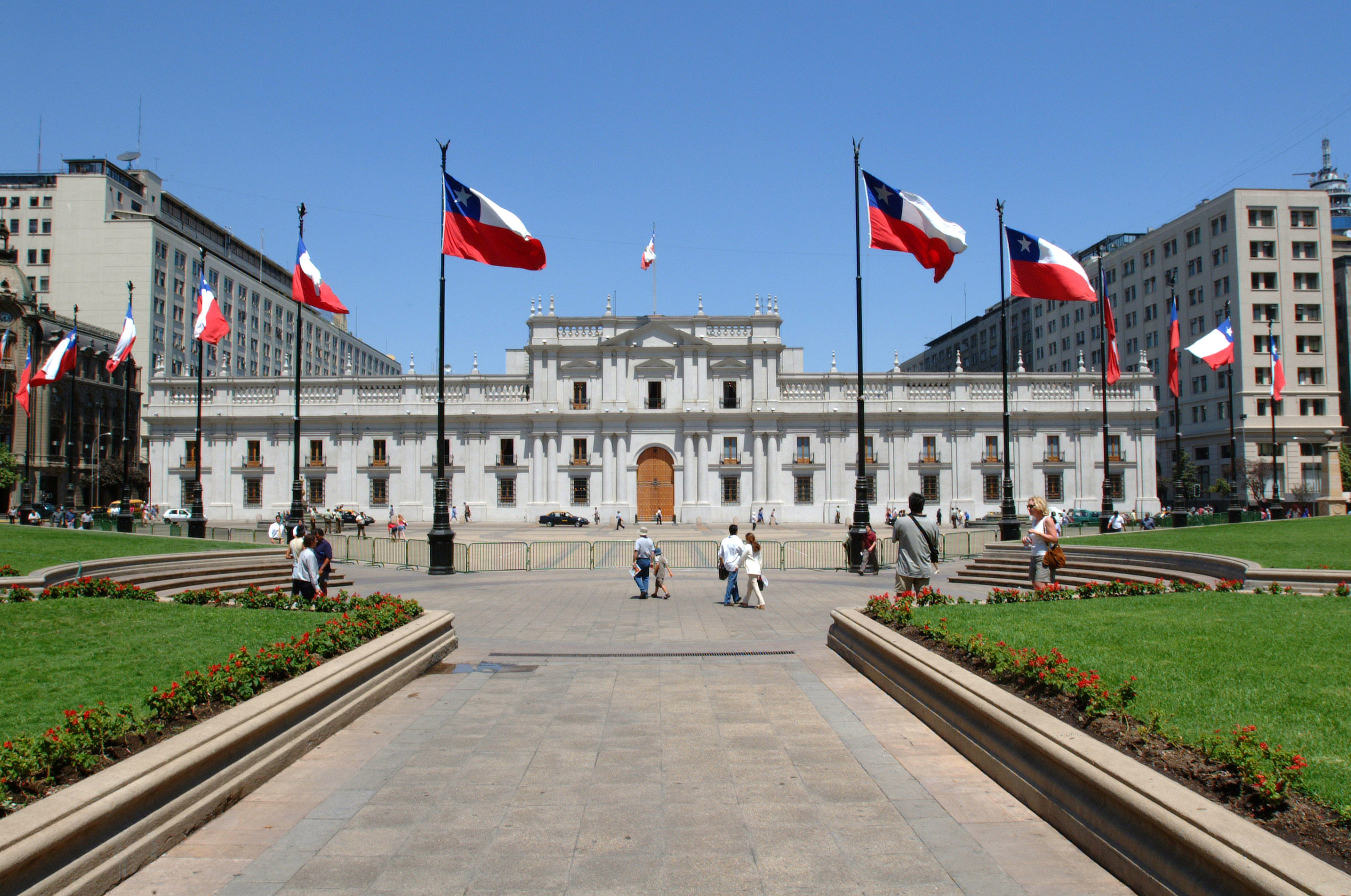 Vista del Palacio de la Moneda desde Plaza de la Constitución.